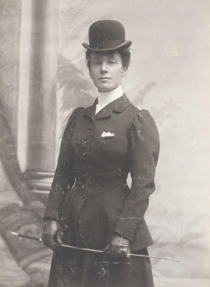 Madeleine Martin-Dior